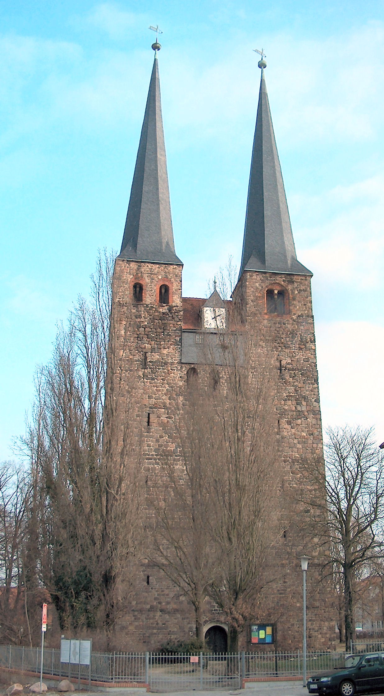 Sankt-Nicolai-Kirche in Burg